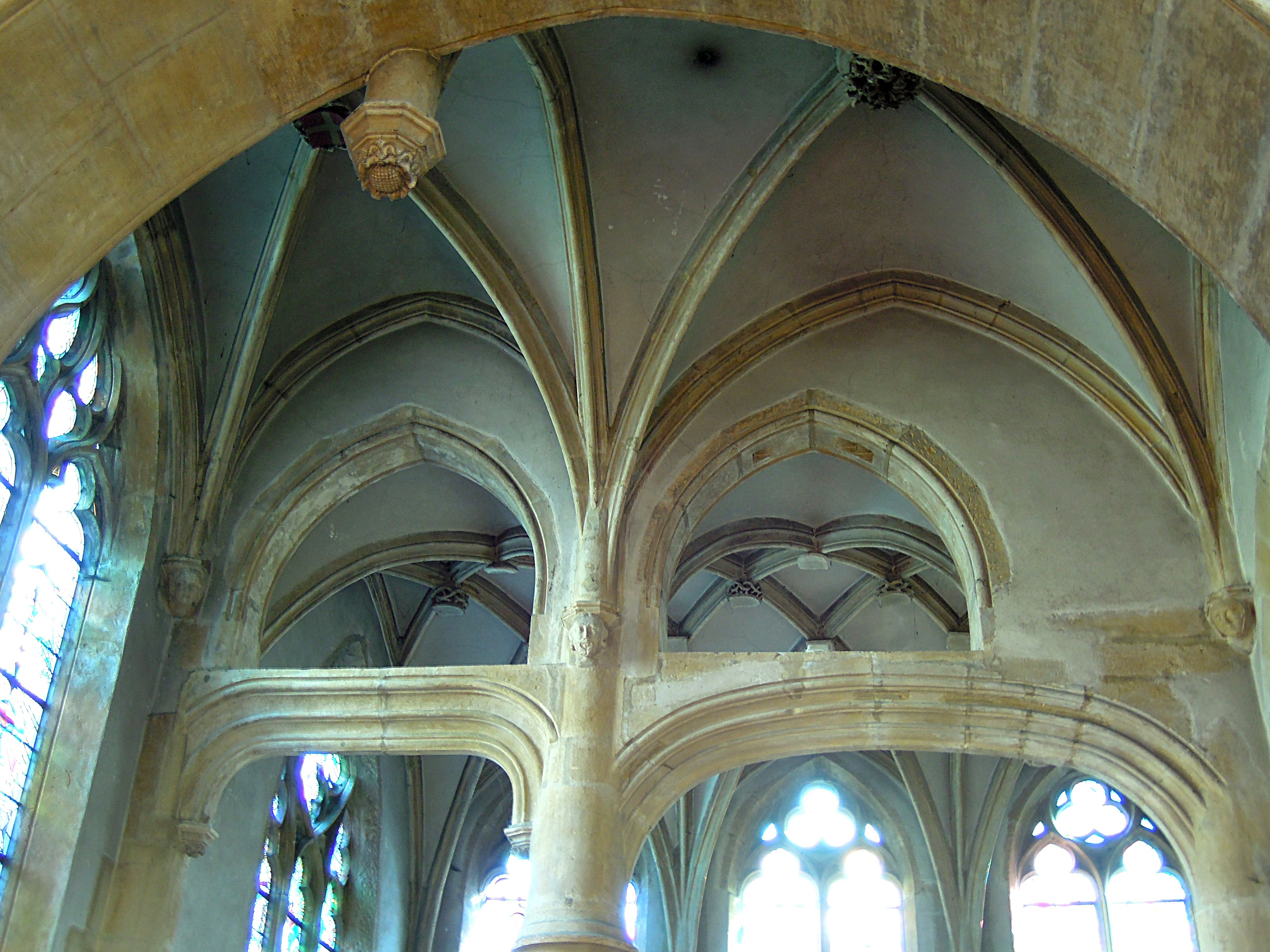 Entrée de la chapelle de Gournay (1452). Arcades en anse de panier. .